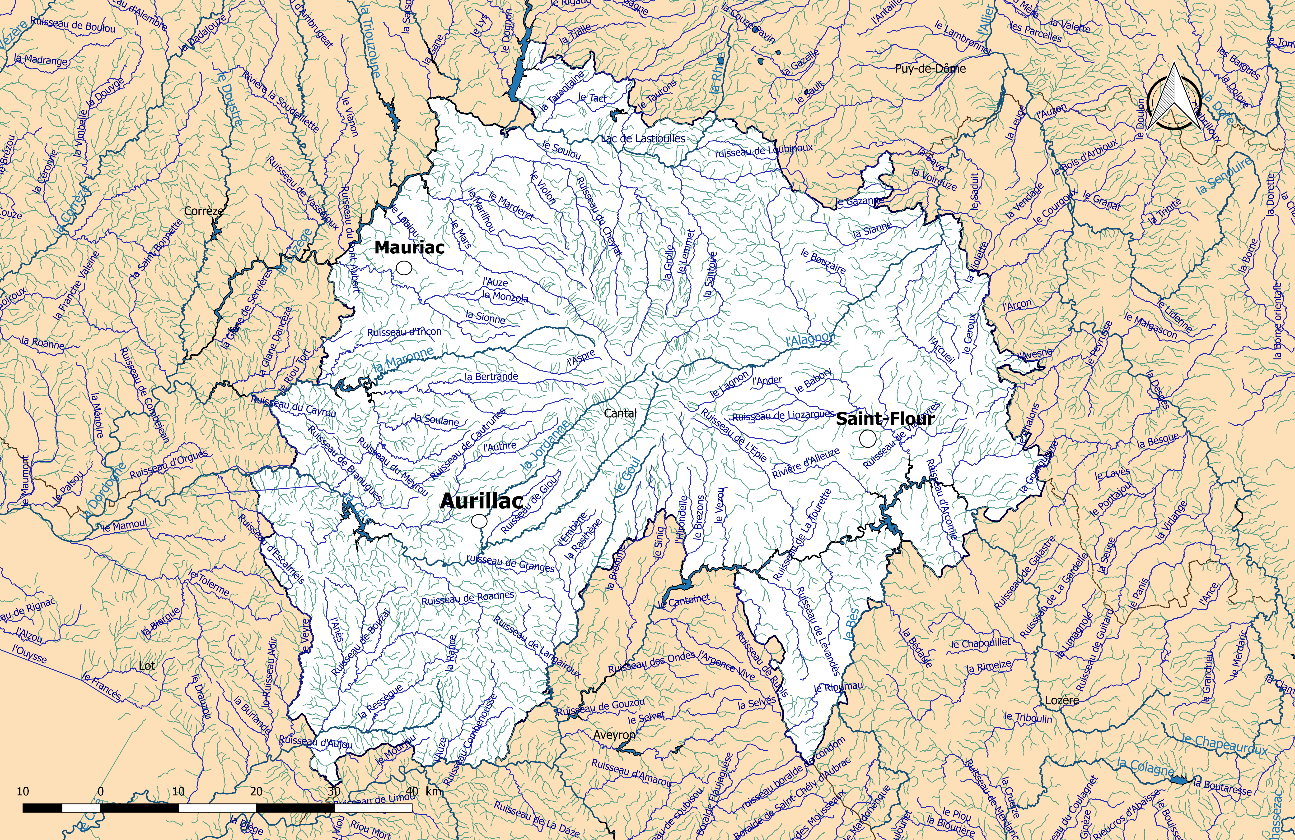 Carte du réseau hydrographique complet du département du Cantal (France).